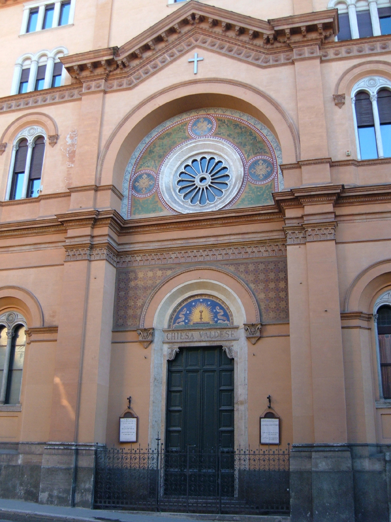 Chiesa evangelica valdese in Roma, bel rione Trevi.